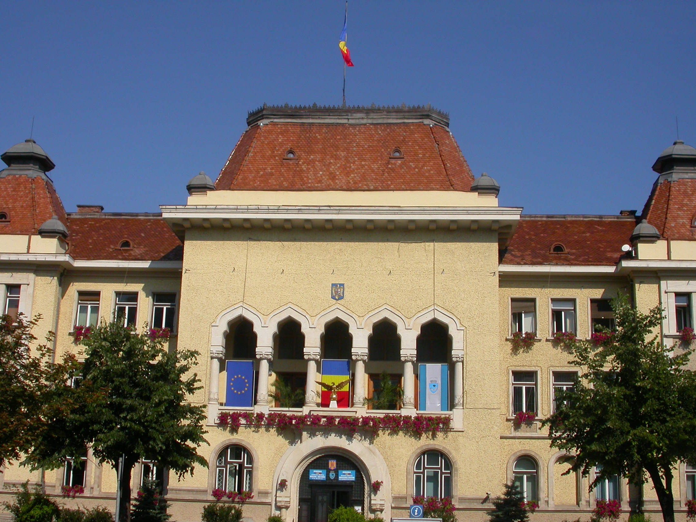 Fostul Palat al Prefecturii, azi Primăria municipiului, 1936 - 1941